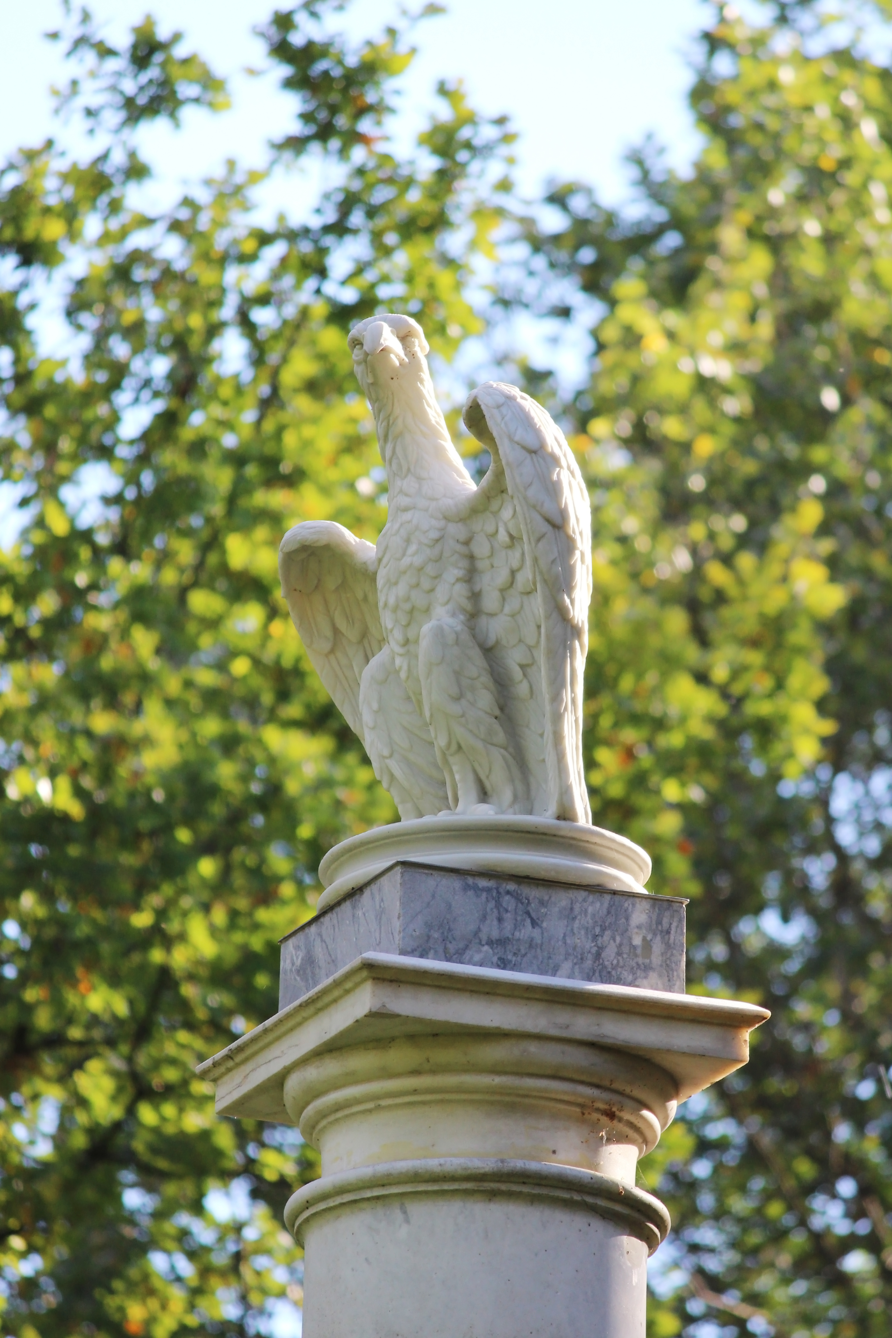 'Колонна Орла': Дворцовый парк, восточная часть, близ Сильвийских ворот, Гатчина, Гатчинский район, Ленинградская область